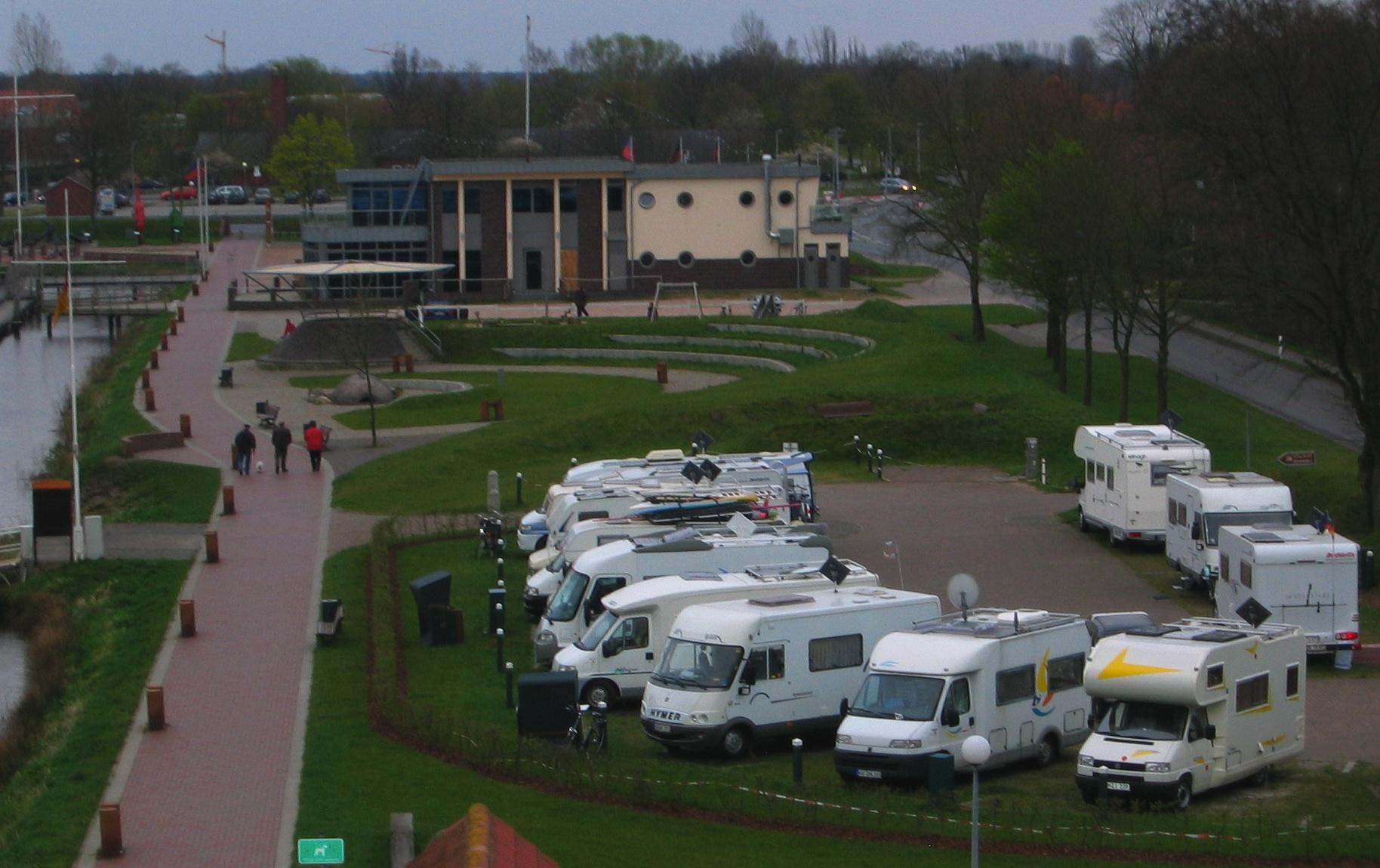 Wohnmobil-Stellplatz am Barßeler Bootshafen